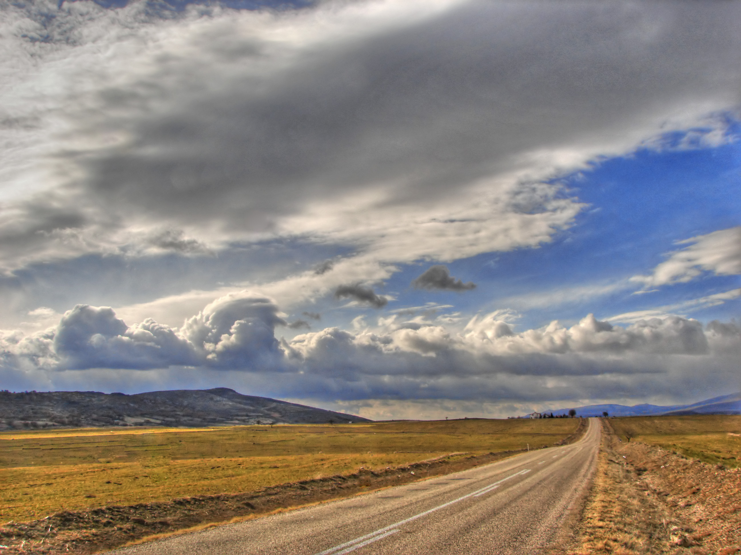 Road, Güdül, Ankara